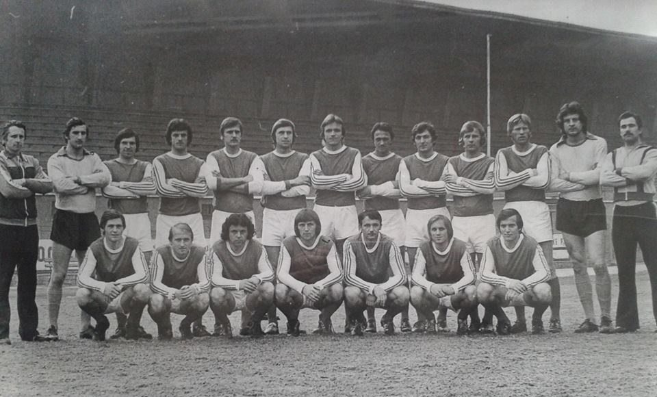 Jedno z najlepších mužstiev z druhej polovice sedemdesiatych rokov minulého storočia